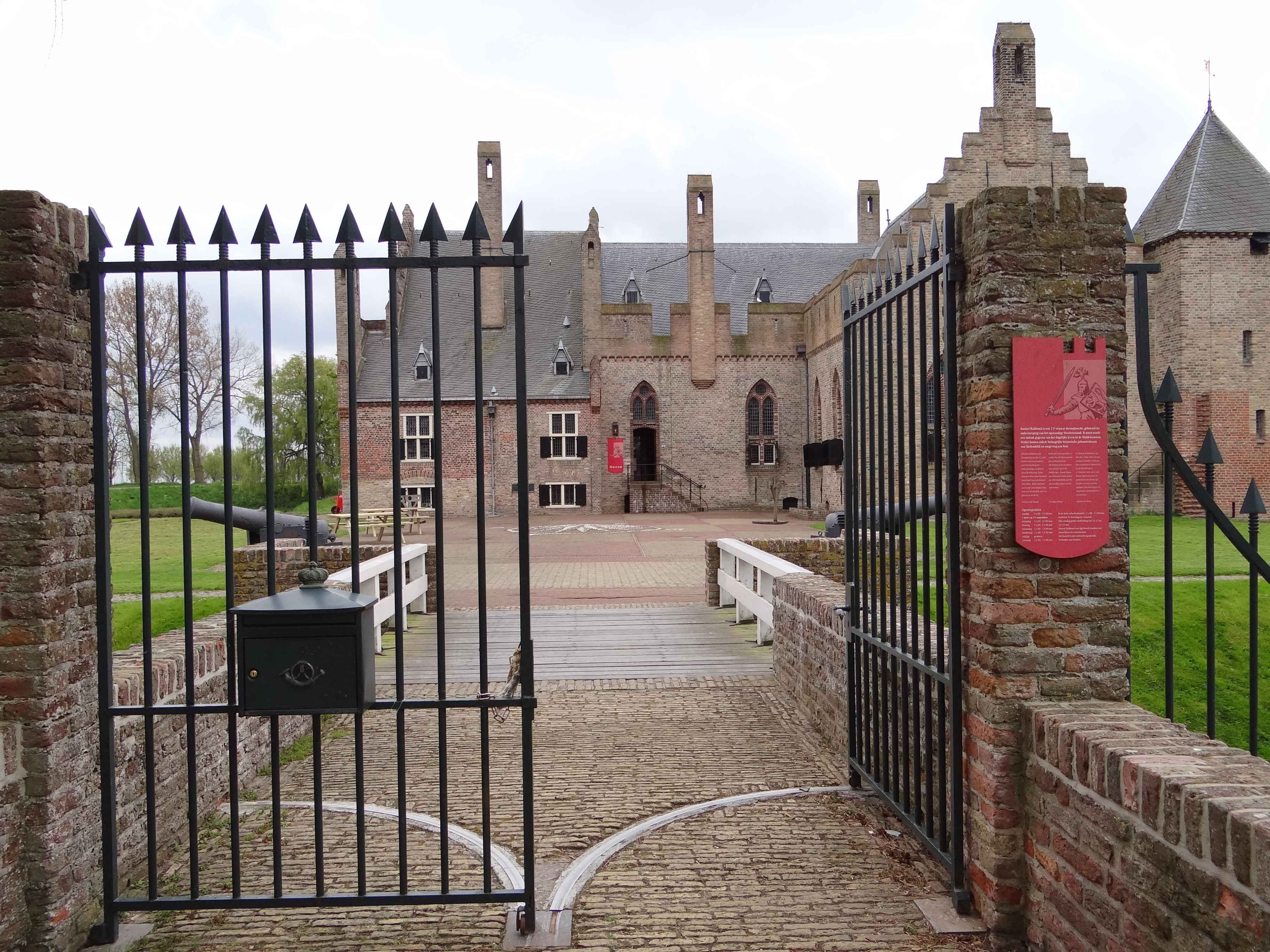 1671 Medemblik, Netherlands